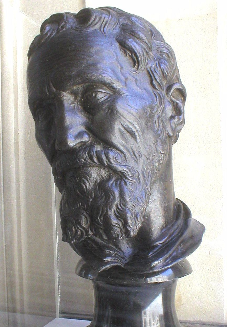 tête en bronze portrait de Michel-Ange attribuée à Daniele Ricciavelli (1509-1566), dit Daniele da Volterra prise de vue personnelle, Musée du Louvre Siren 25 jun 2005 à 19:48 (CEST)